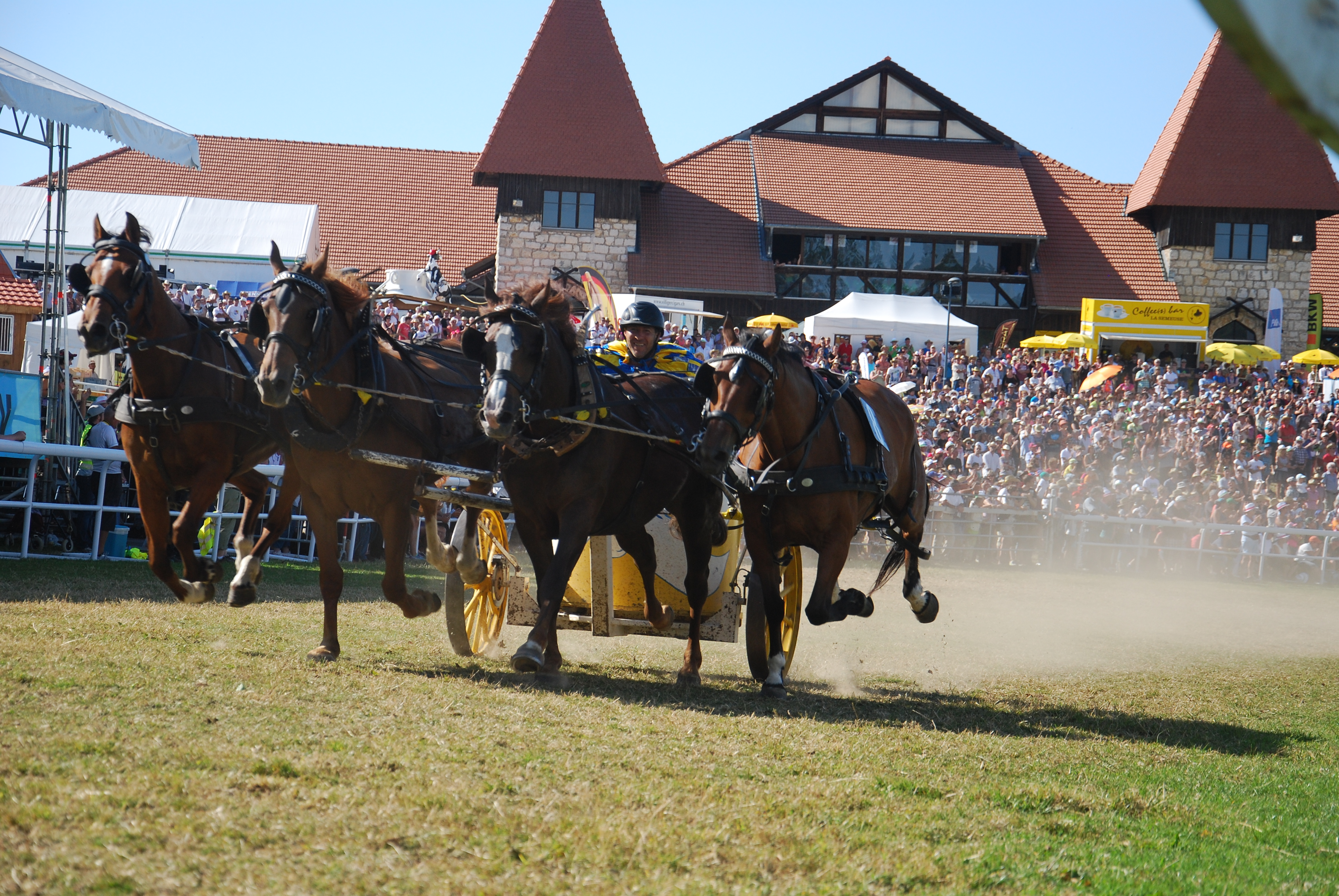 Marché-Concours 2016 - Römische Streitwagen mit 4 Pferden